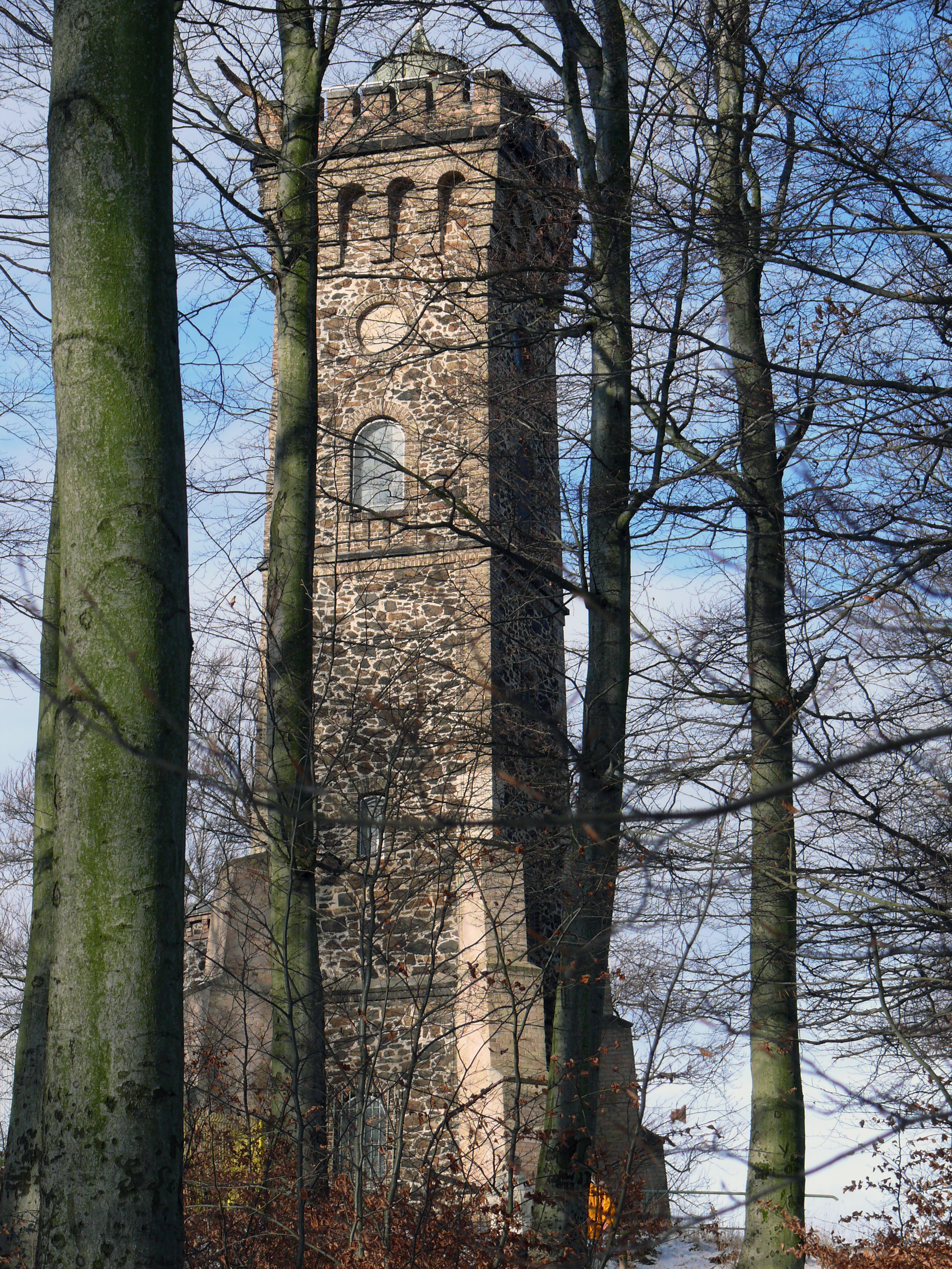 Turm der Wilhem-Raabe-Warte